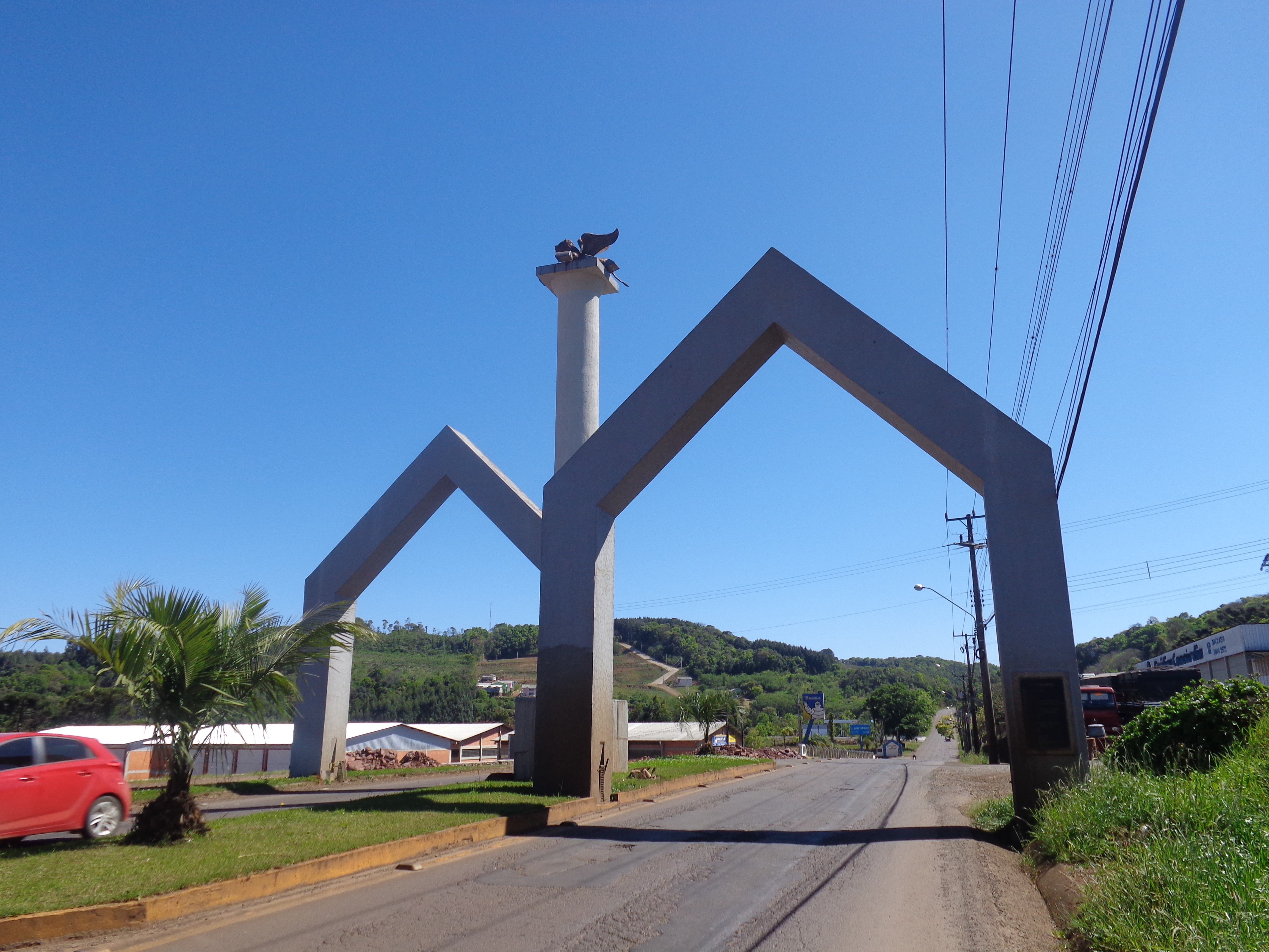 Portal de entrada de Concórdia, Santa Catarina